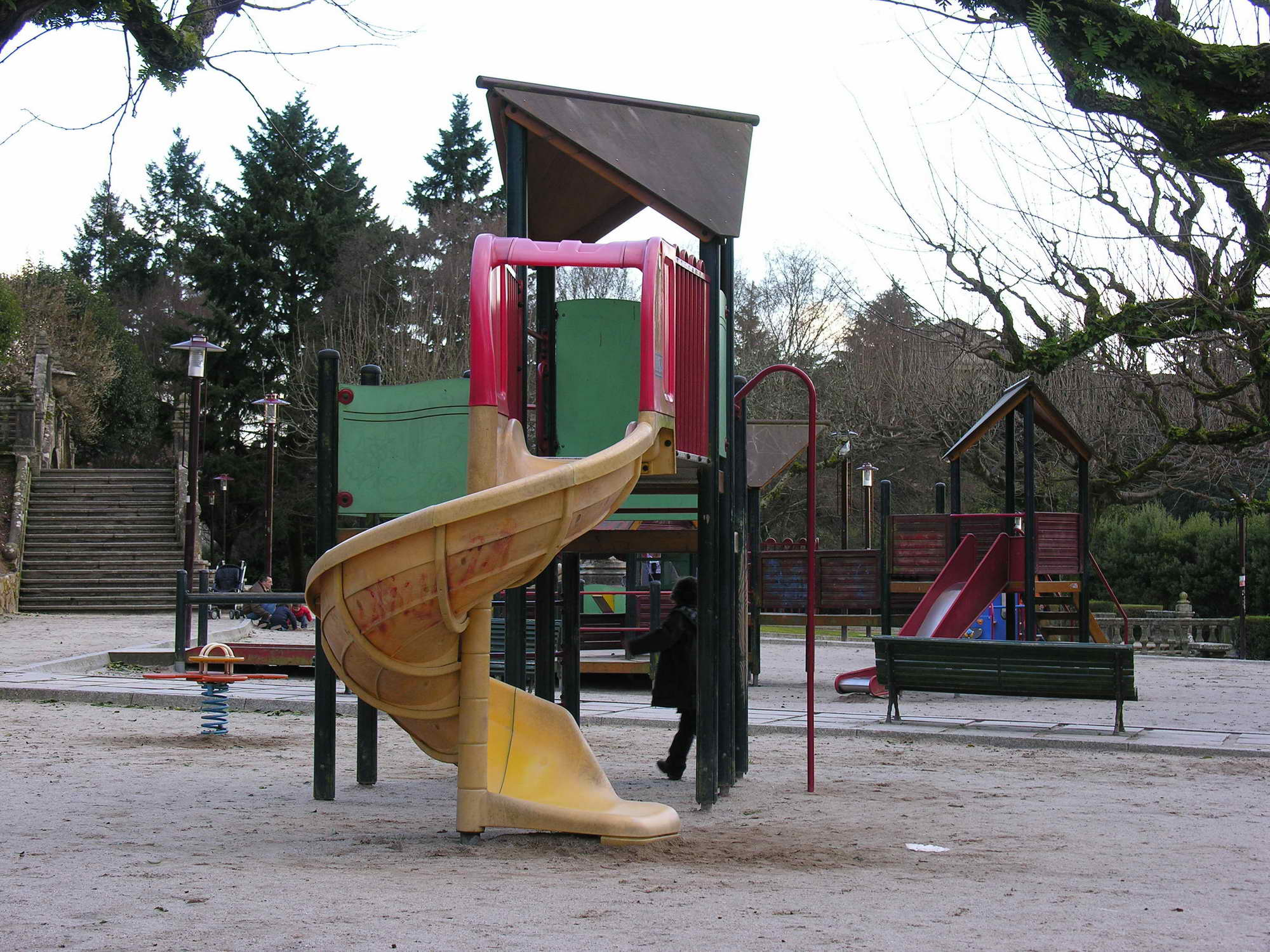 self made Santiago de Compostela Galicia, Spain Parque do campus